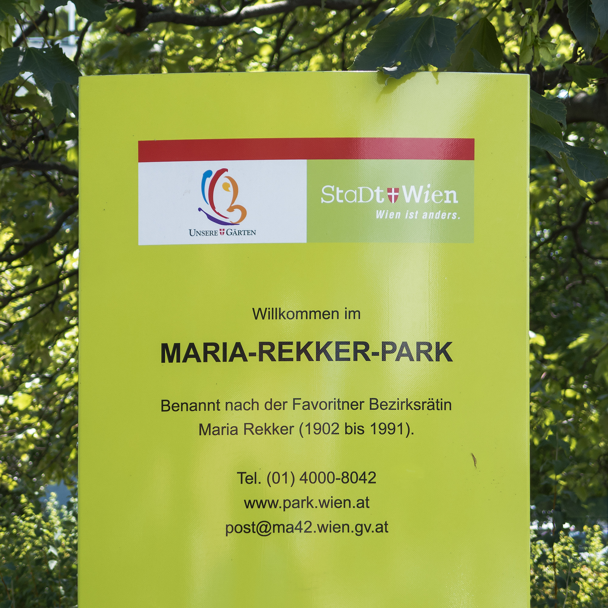 Maria-Rekker-Park in Wien (zum Aufnahmezeitpunkt Baustelle der U1-Süd-Verlängerung)